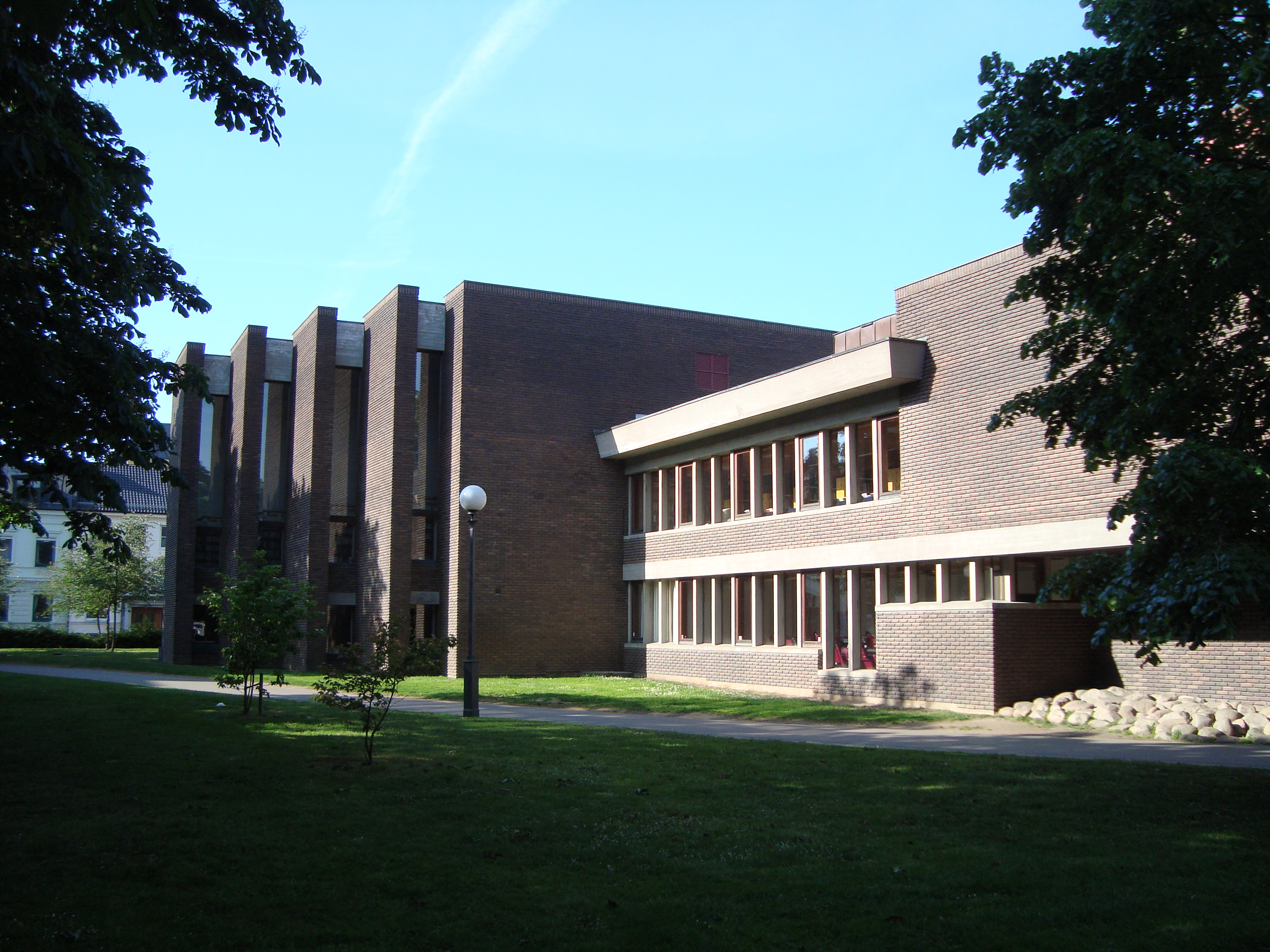 Östra fasaden på Stadbiblioteket i Helsingborg.